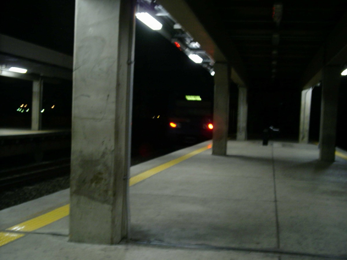 Plataforma da Estação Presidente Altino, da Línha 8 - Diamante da CPTM em São Paulo, Brasil.